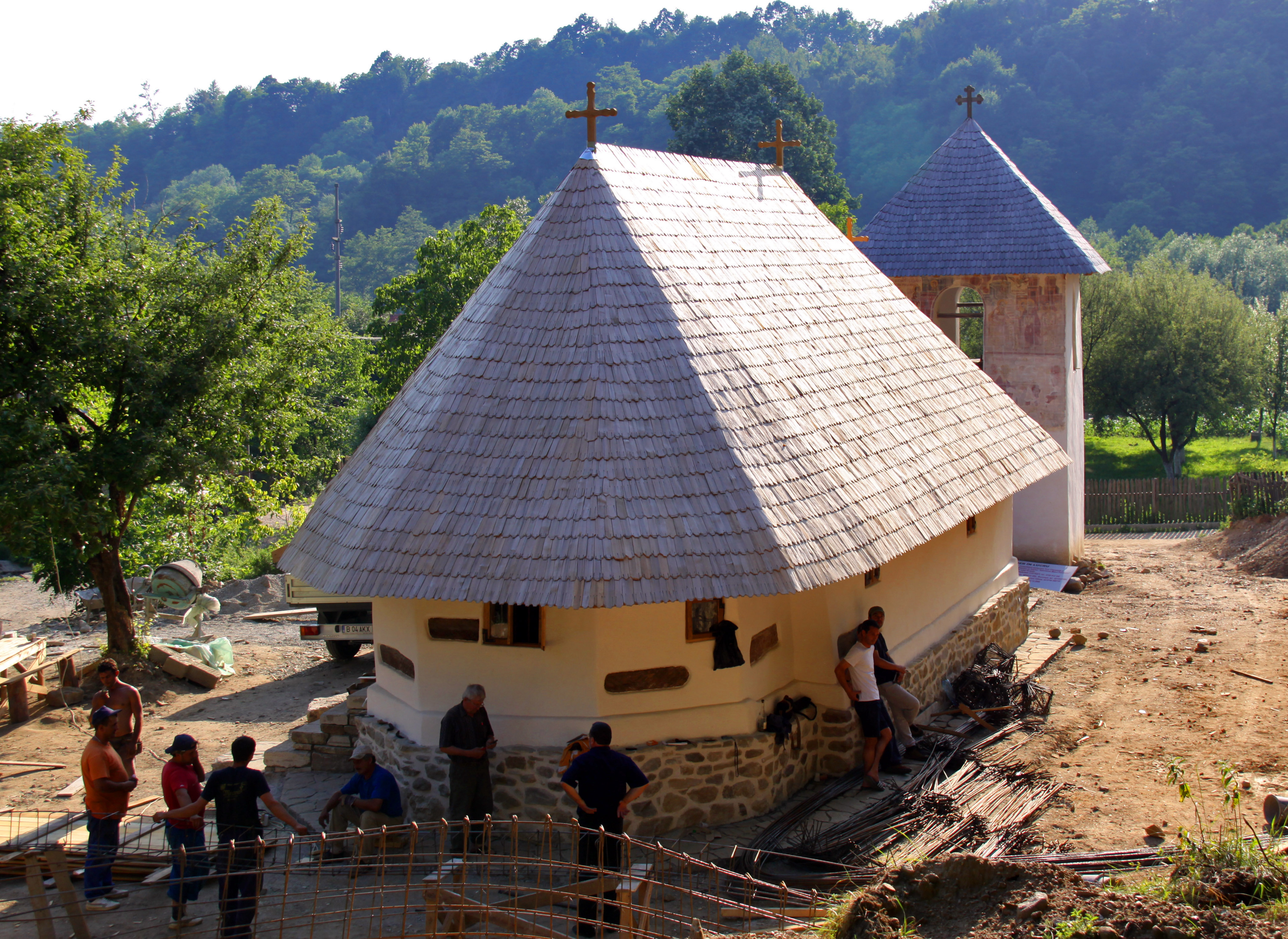 Costești, cătunul Grușetu, biserica de lemn: perspectivă dinspre nord-est.